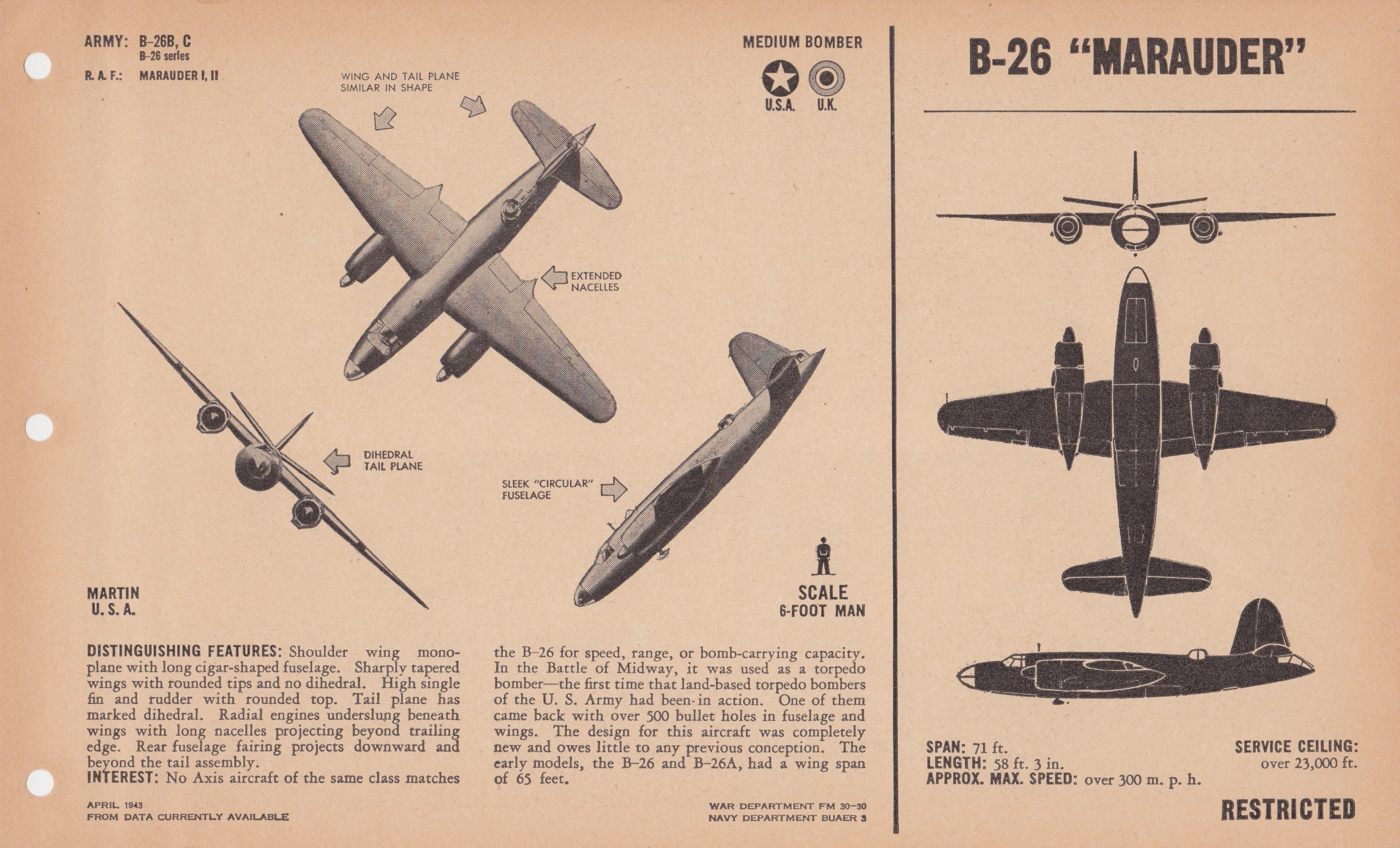 B-26 "MARAUDER"